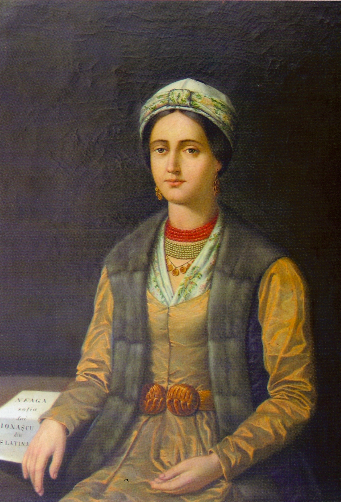 Portretul Neagăi Ionașcu (Cupețu), Muzeul de Artă din Brașov